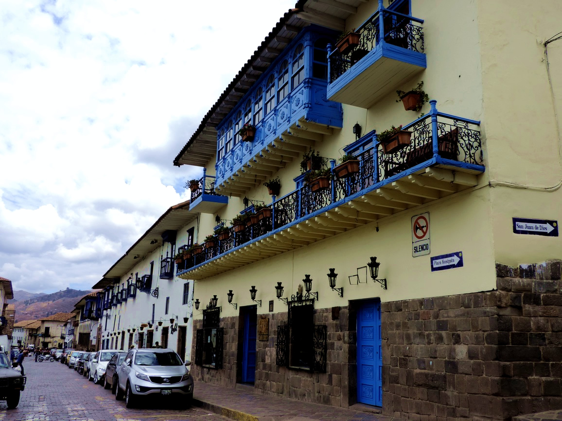 Cuzco (Peru)